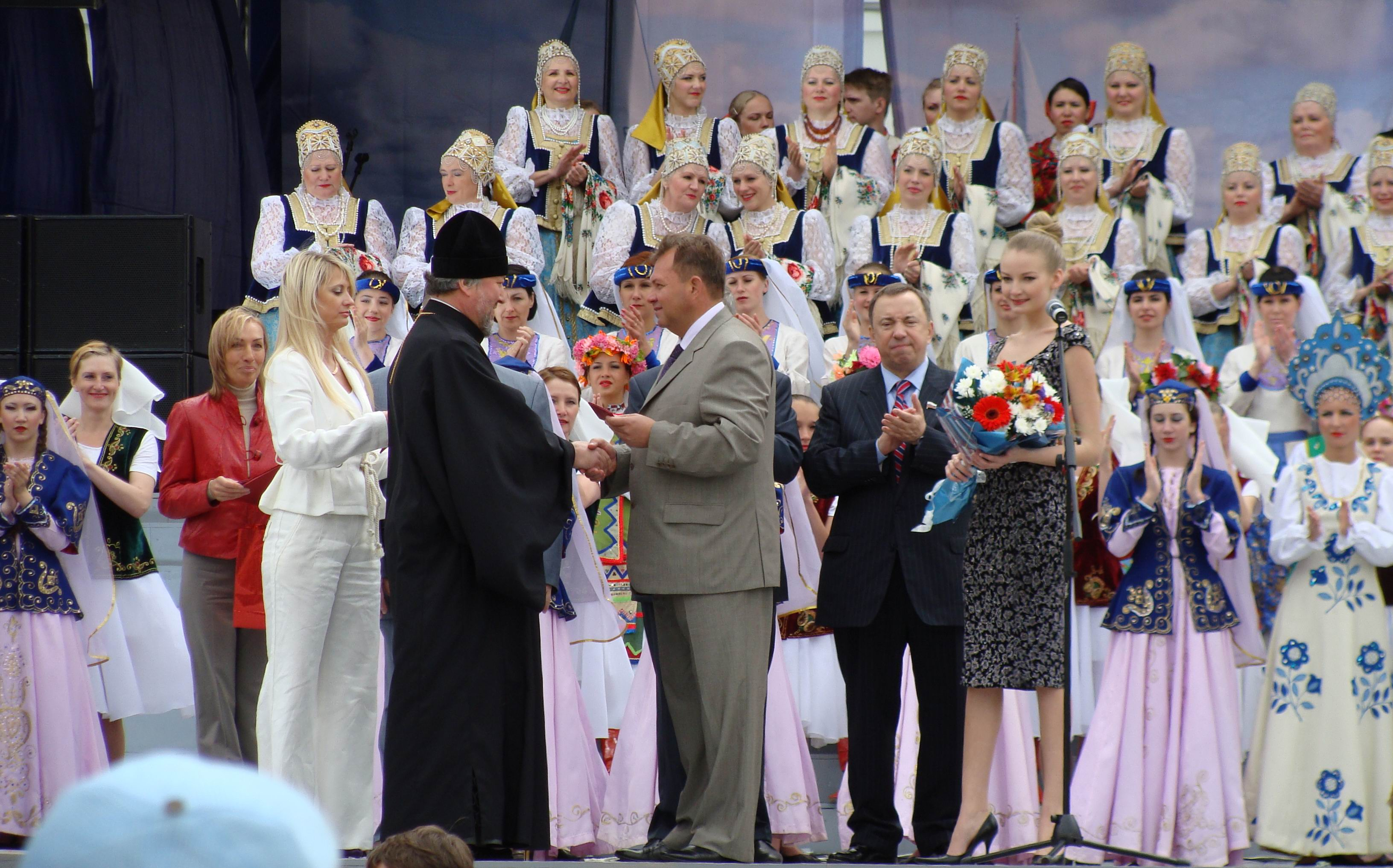 Мэр Архангельска вручает Епископу Тихону мирскую награду и пожимает ему руку (вместо того, чтоб ее целовать), как будто тот, член его партии...